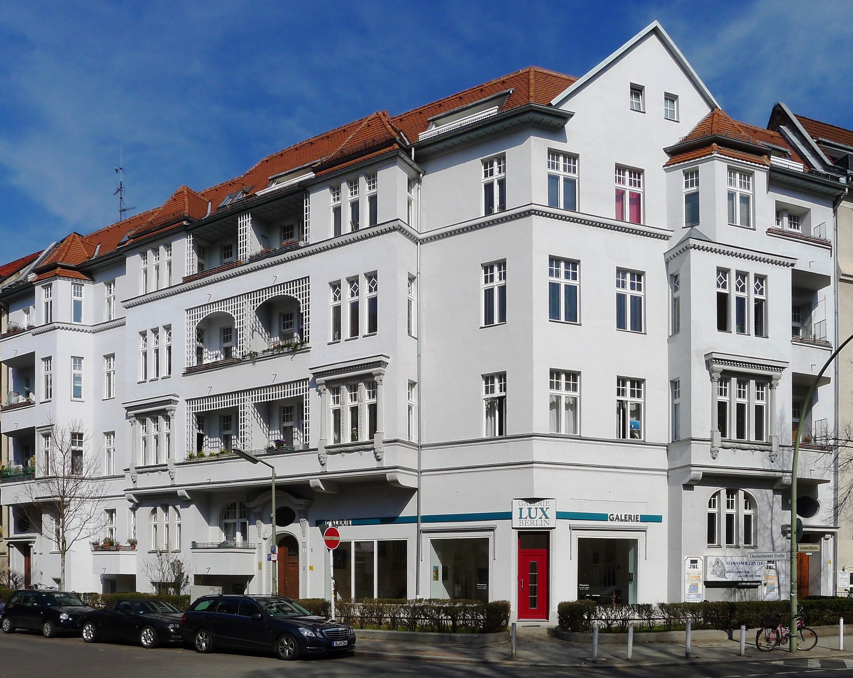 Miethaus